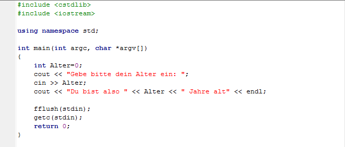 Ein Quellcodebeispiel mit Dev-C++ in C++